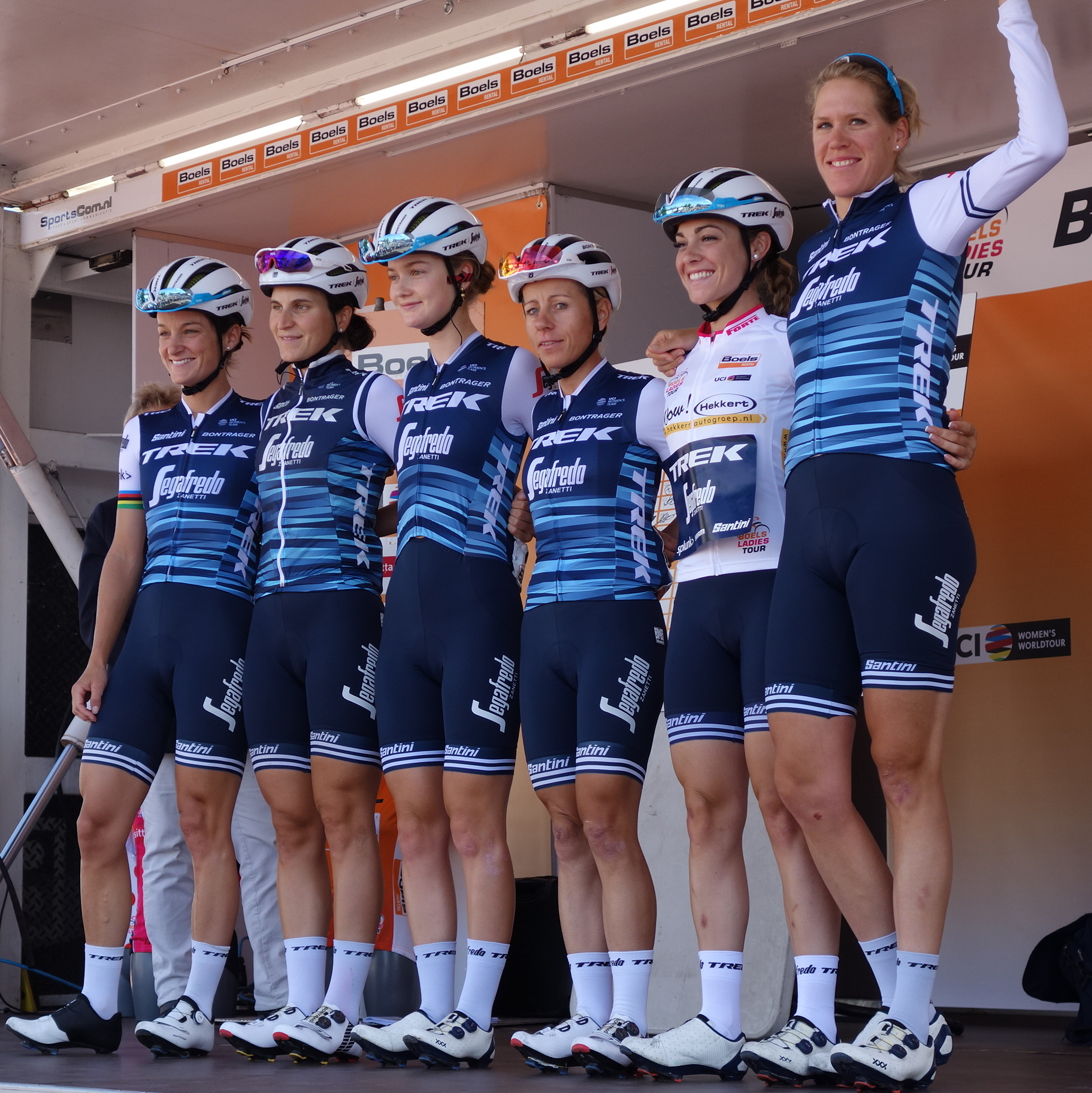 Trek-Segafredo bij de start van de eerste etappe van Stramproy naar Weert in de Boels Ladies Tour 2019